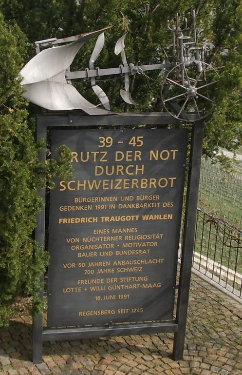 Regensberg ZH, Switzerland self-made, March 2007